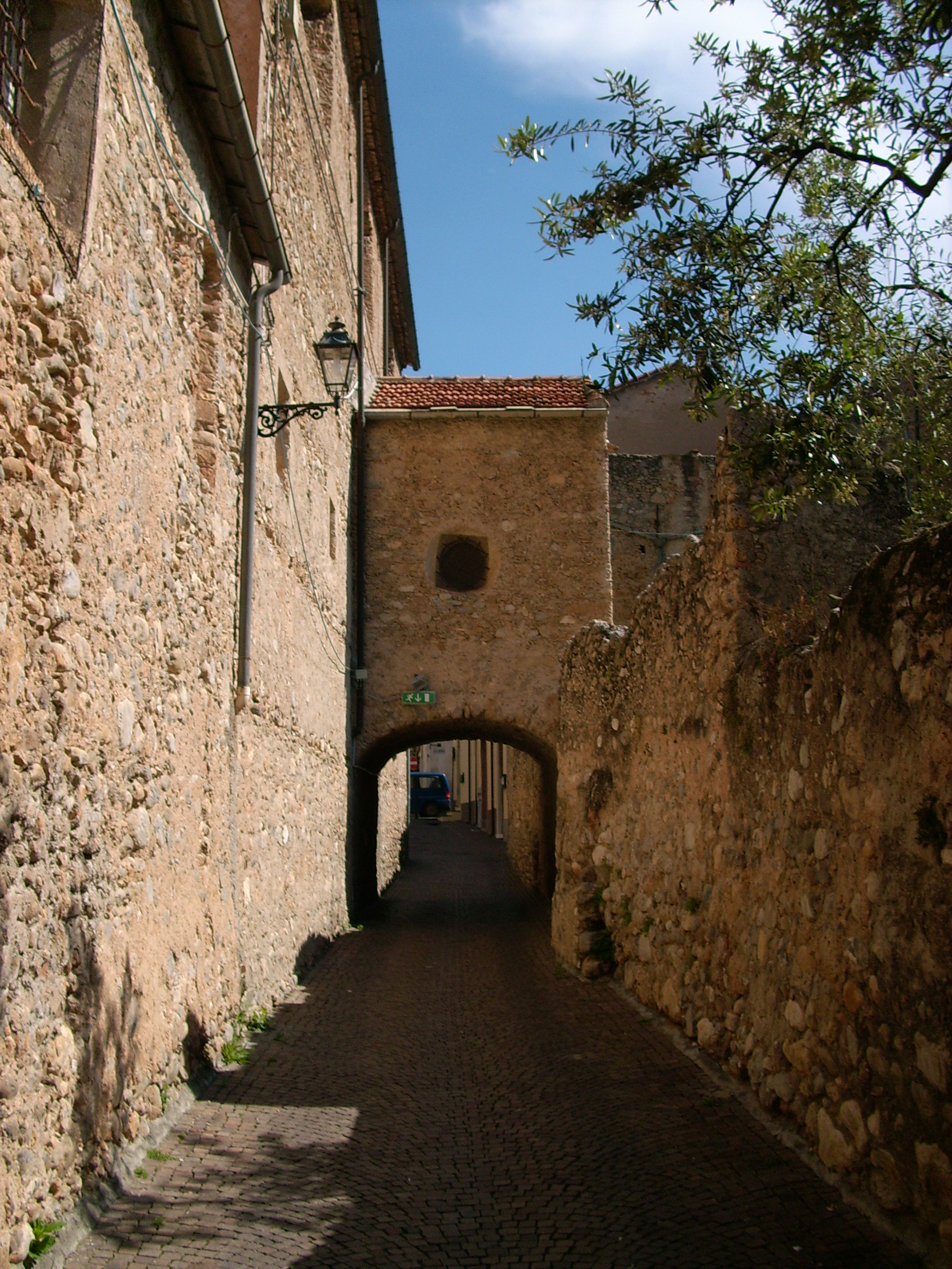 Cisano sul Neva, Liguria, Italia